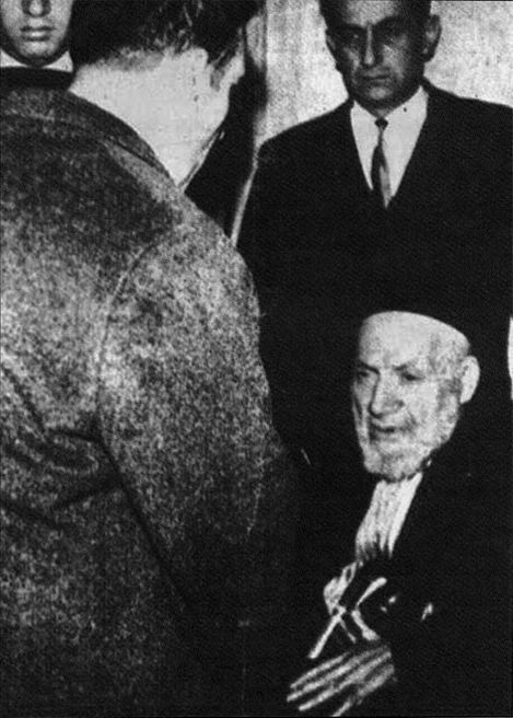 אלי כהן אומר וידוי לצד רבה הראשי של דמשק, נסים נדבו, לפני העלאתו לגרדום, מאי 1965